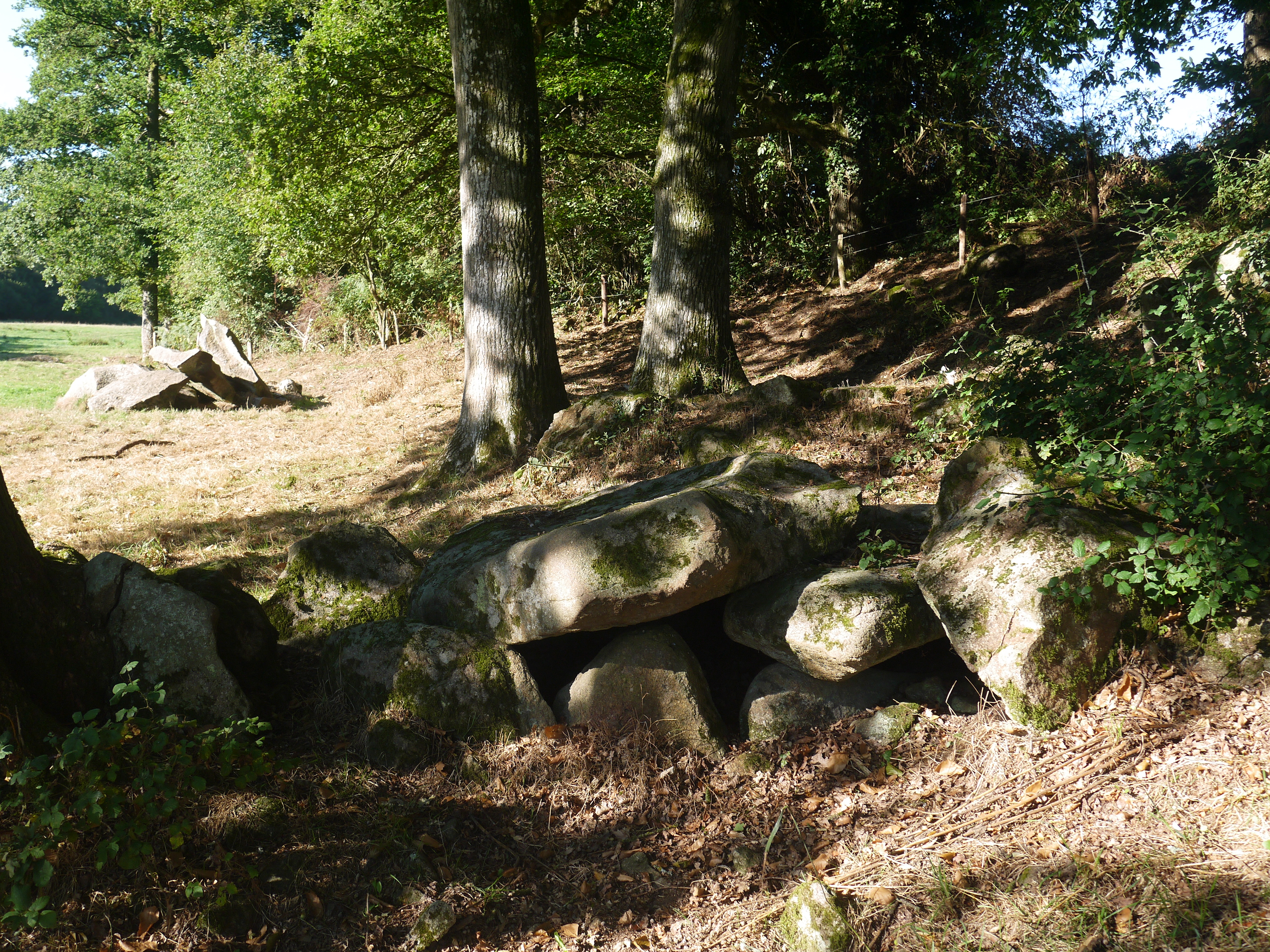 Le côté septentrional.